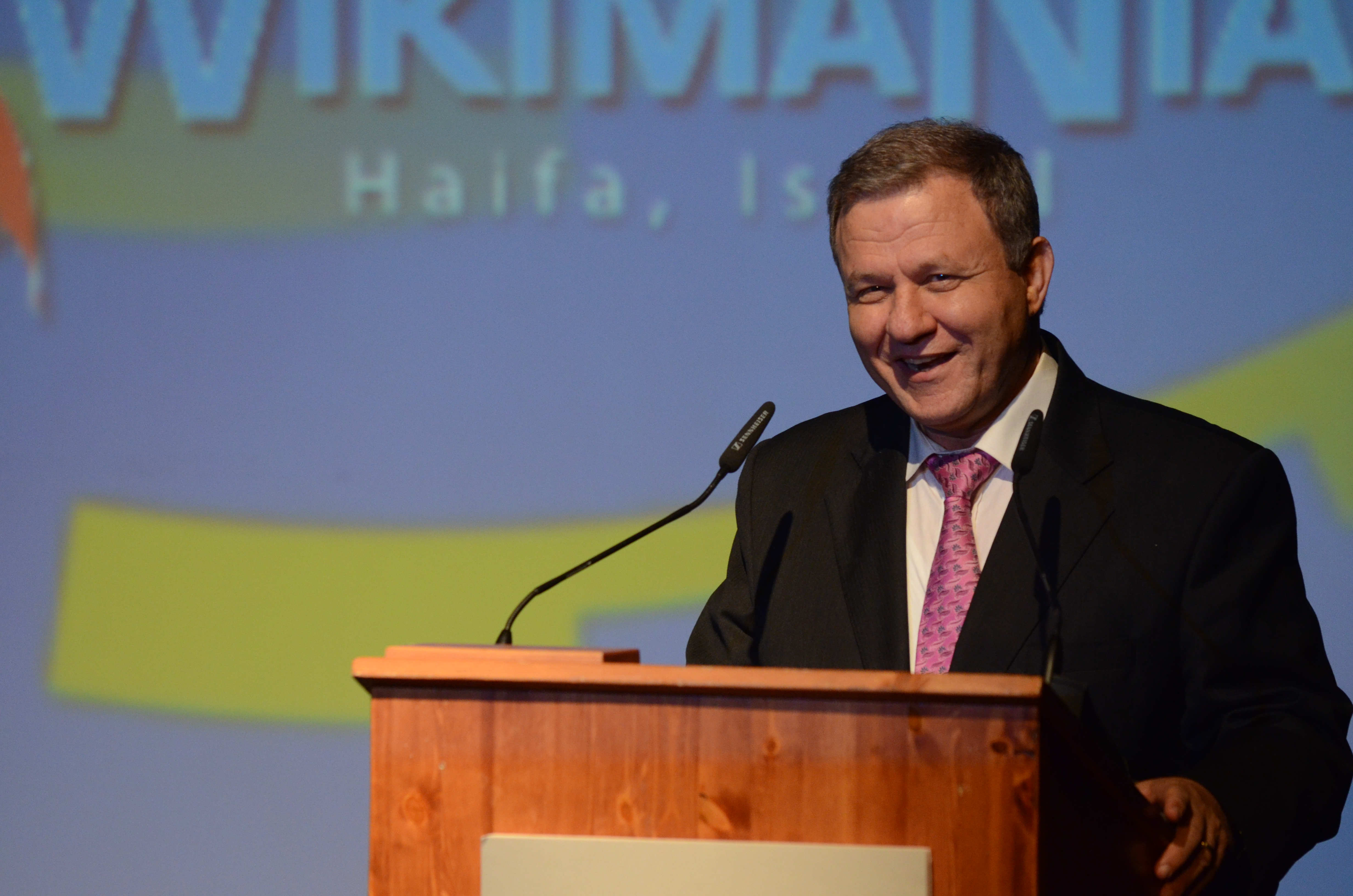 Wikimania 2011 - opening ceremony